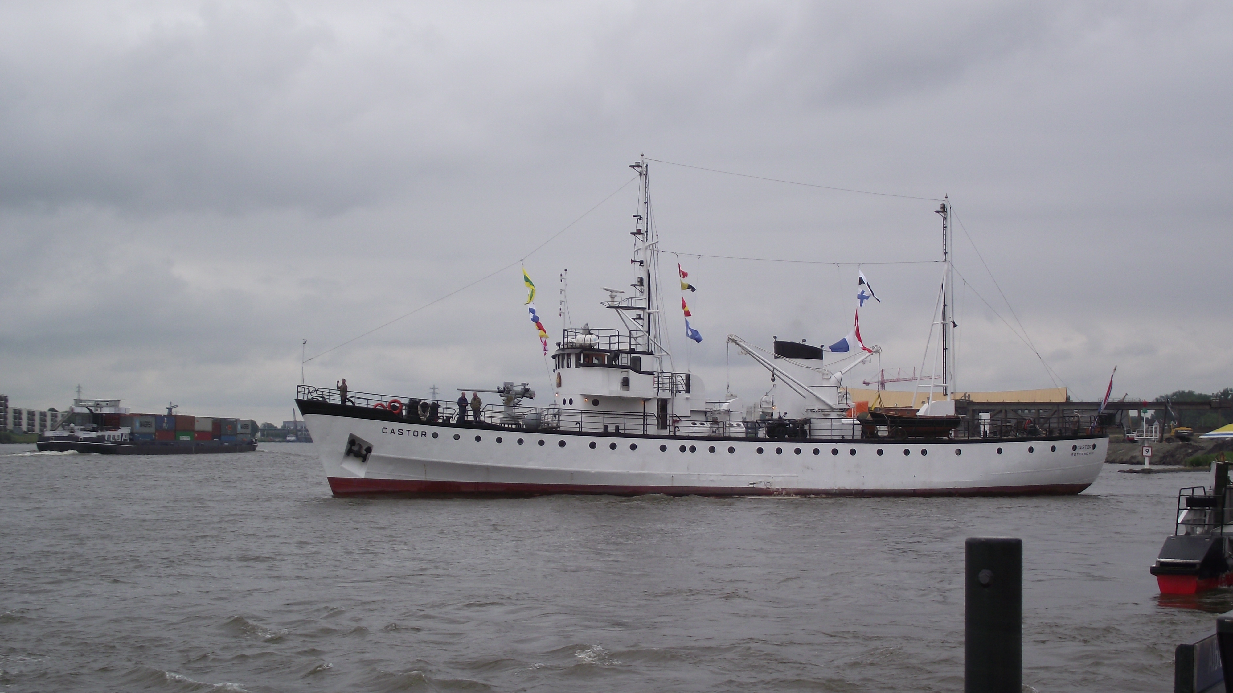 Loodsboot Castor, gebouwd in 1950, tijdens Dordt in stoom. Deze boot had een dubbele functie en in oorlogstijd was deze een communicatievaartuig voor de marine. Dit schip is daarom uitgerust met een kanon.